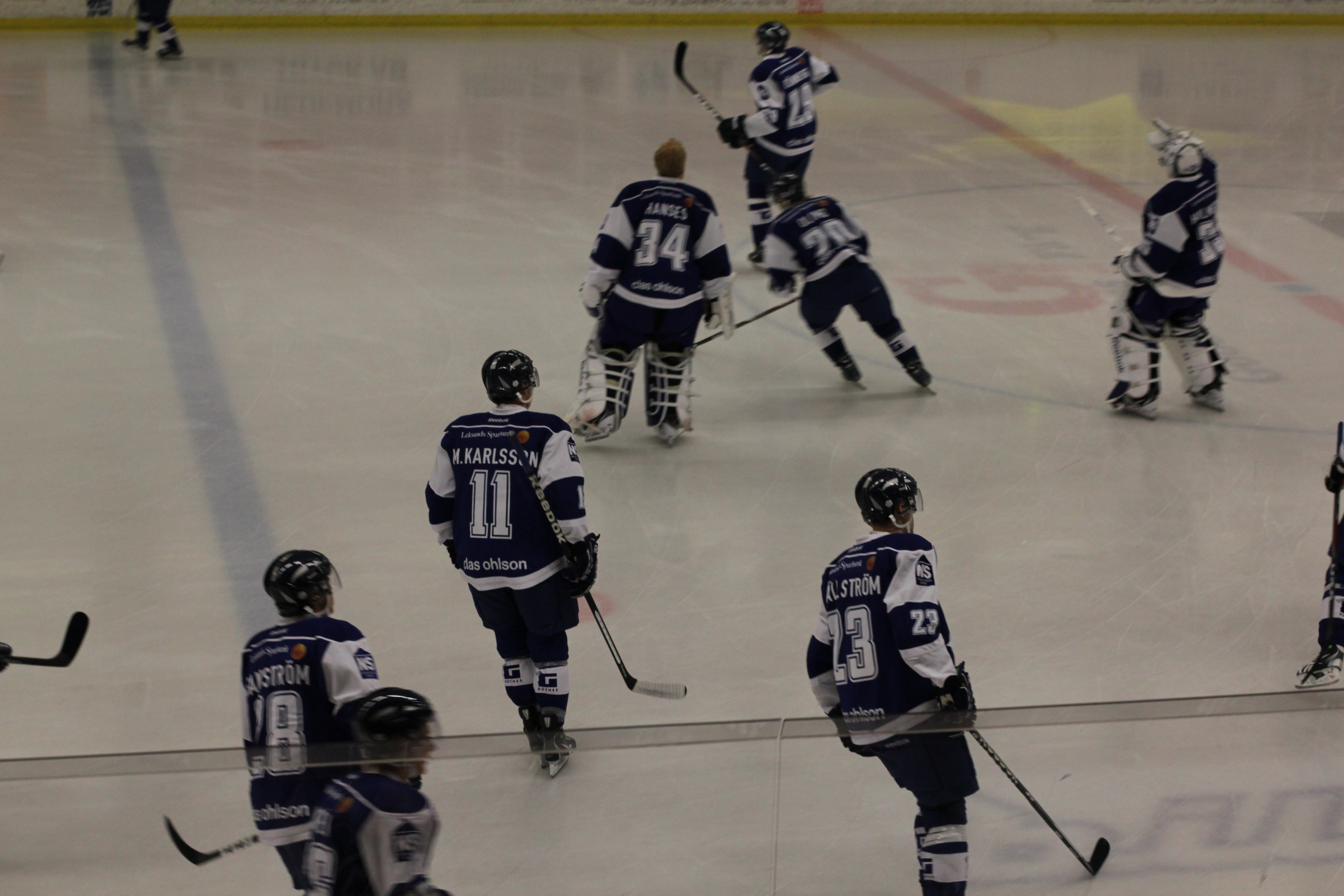 Uppvisningsmatch mellan Leksands IF och Bofors IK, Bolidenhallen, Hedemora